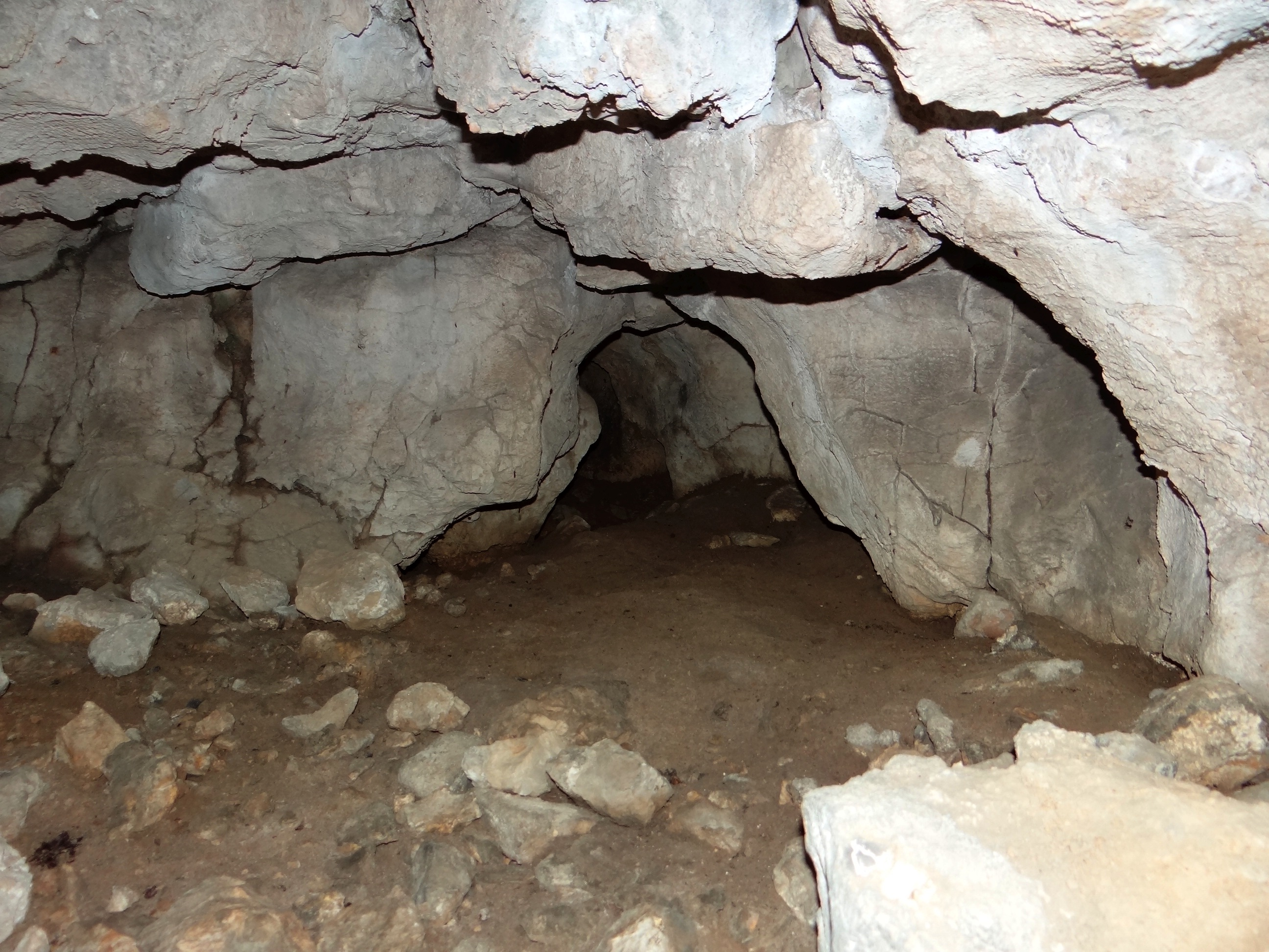 Jaskinia Mała na Wrzosach